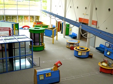 出雲科学館、体験型展示の写真